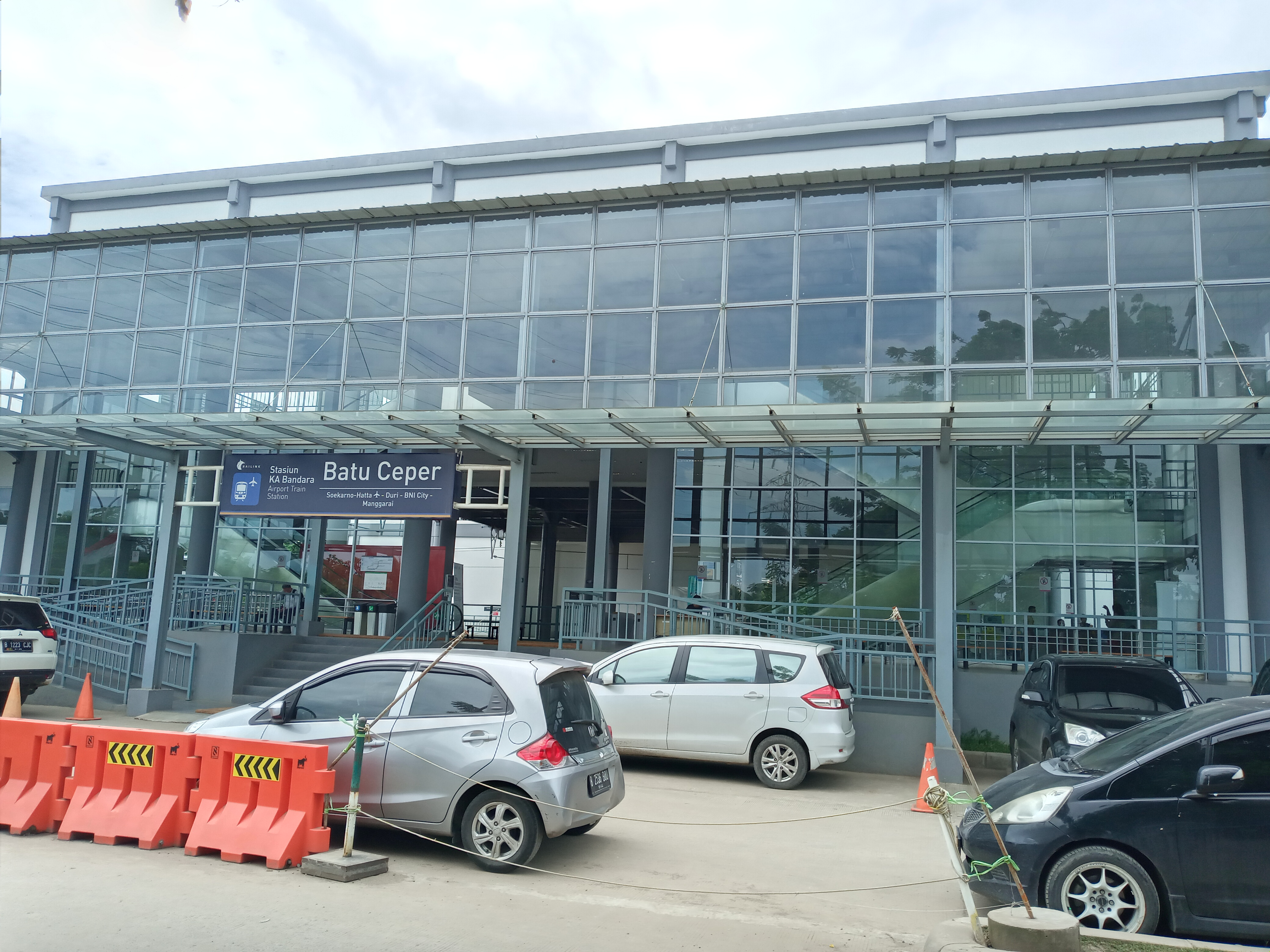 Pintu utara Stasiun Batuceper yang dikhususkan untuk penumpang KA Bandara Soekarno-Hatta.